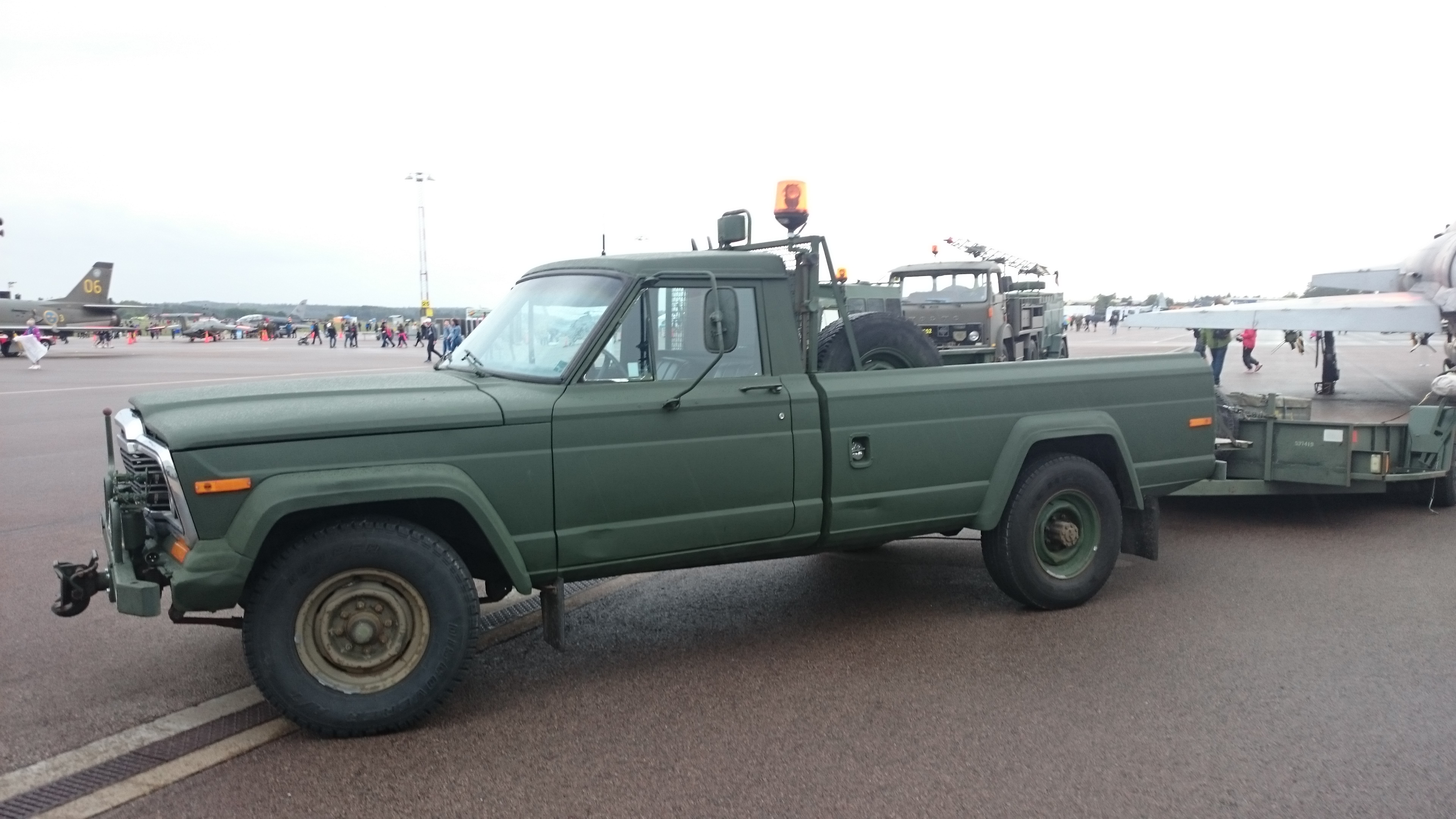 Uppställning av fordon för klargörning av JA-37 Viggen enligt flygbassystemet BAS-90 på flygdagarna 2016 på Malmen